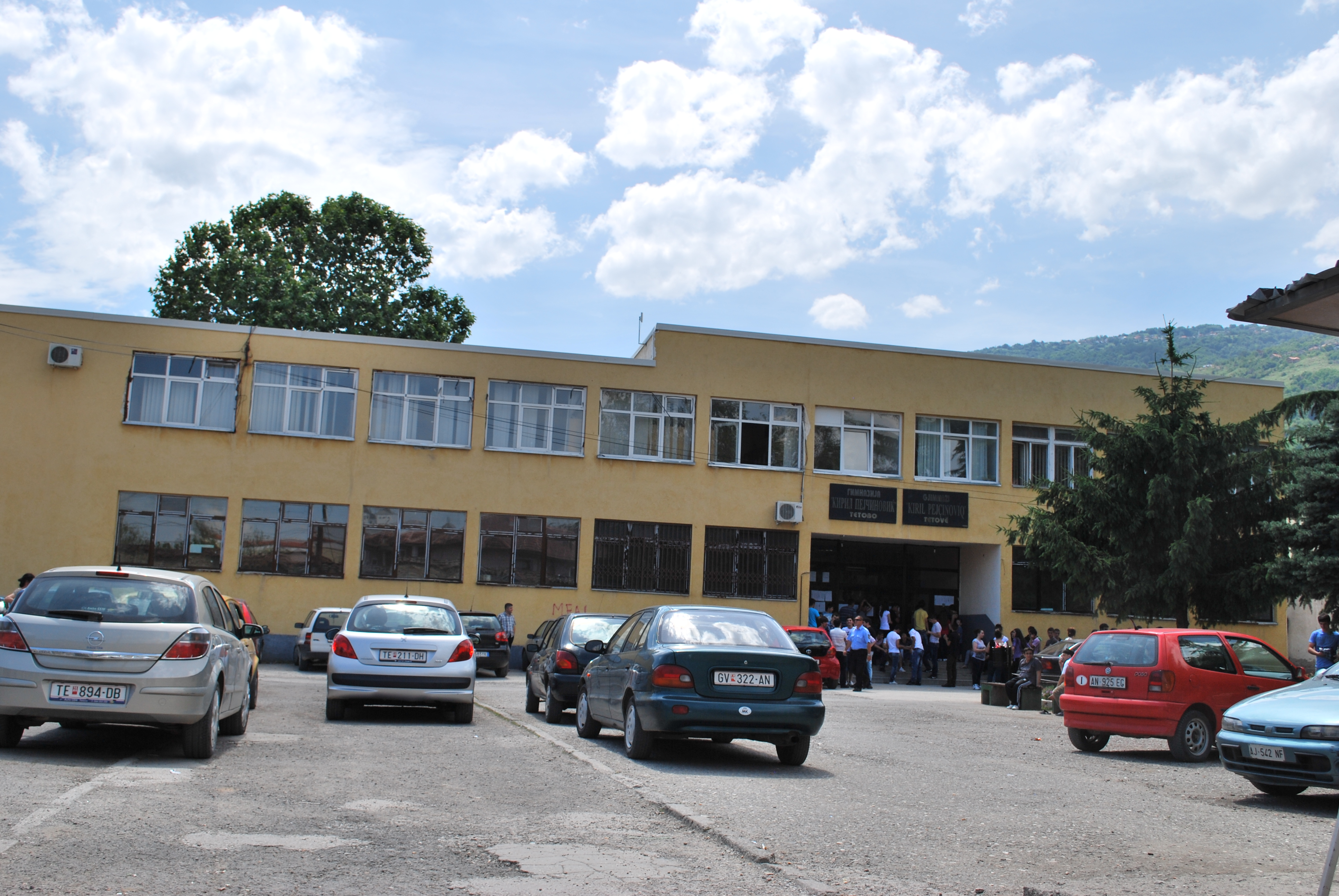 Гимназијата Кирил Пејчиновиќ во Тетово